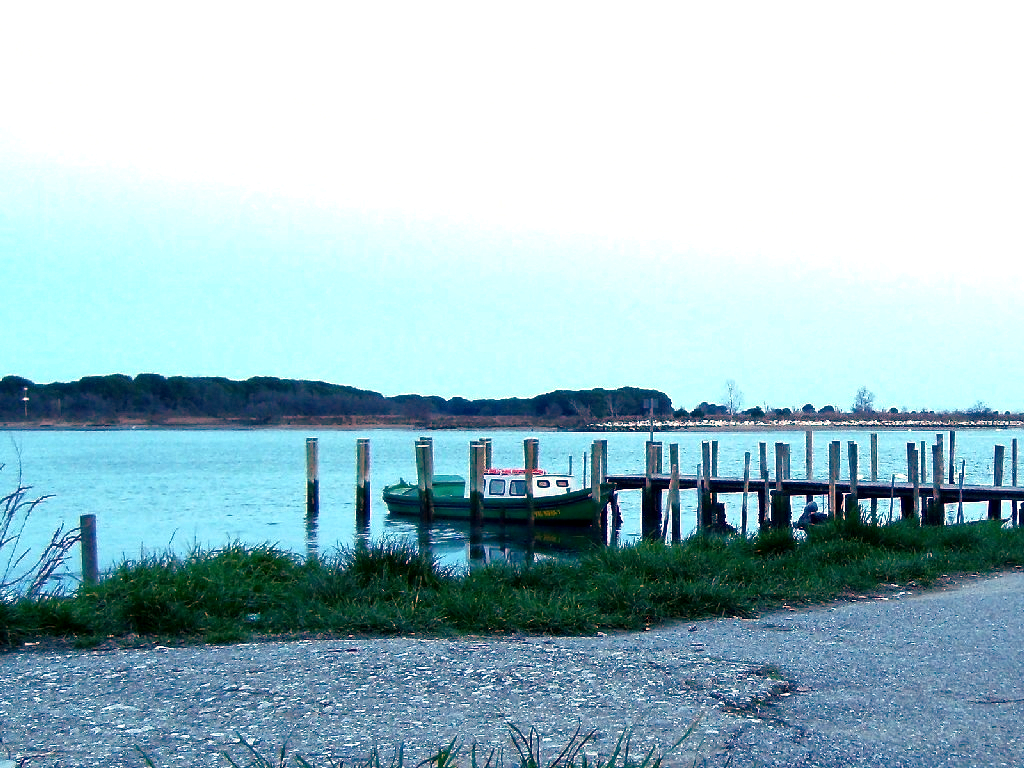 immagine serale della laguna di Caorle del 17 febbraio 2007